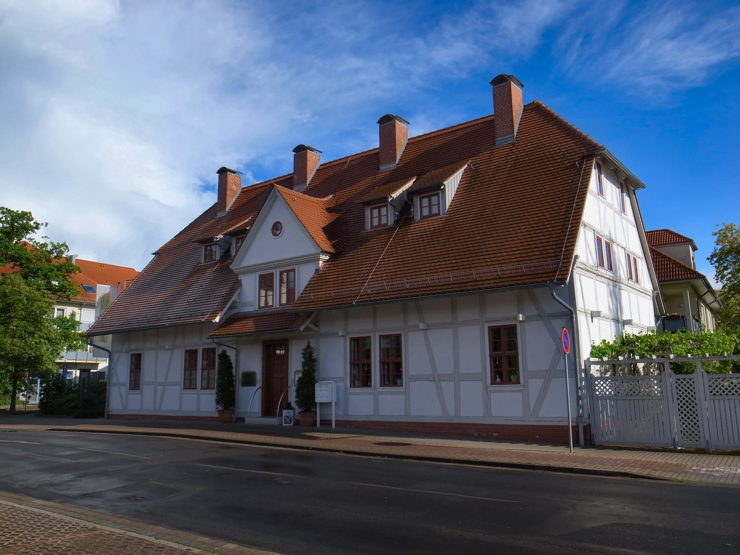 Dessau, Das Pächterhaus ist das älteste Haus des Stadtteils Ziebigk (1743, Quelle